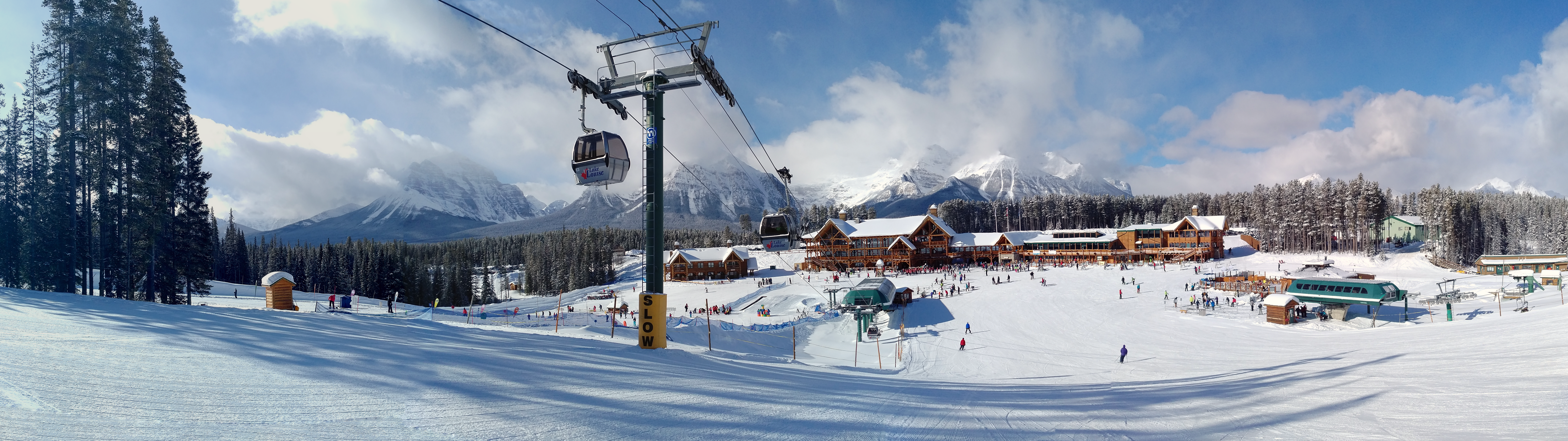 Sur les pistes de la station Lake Louise, mars 2017.